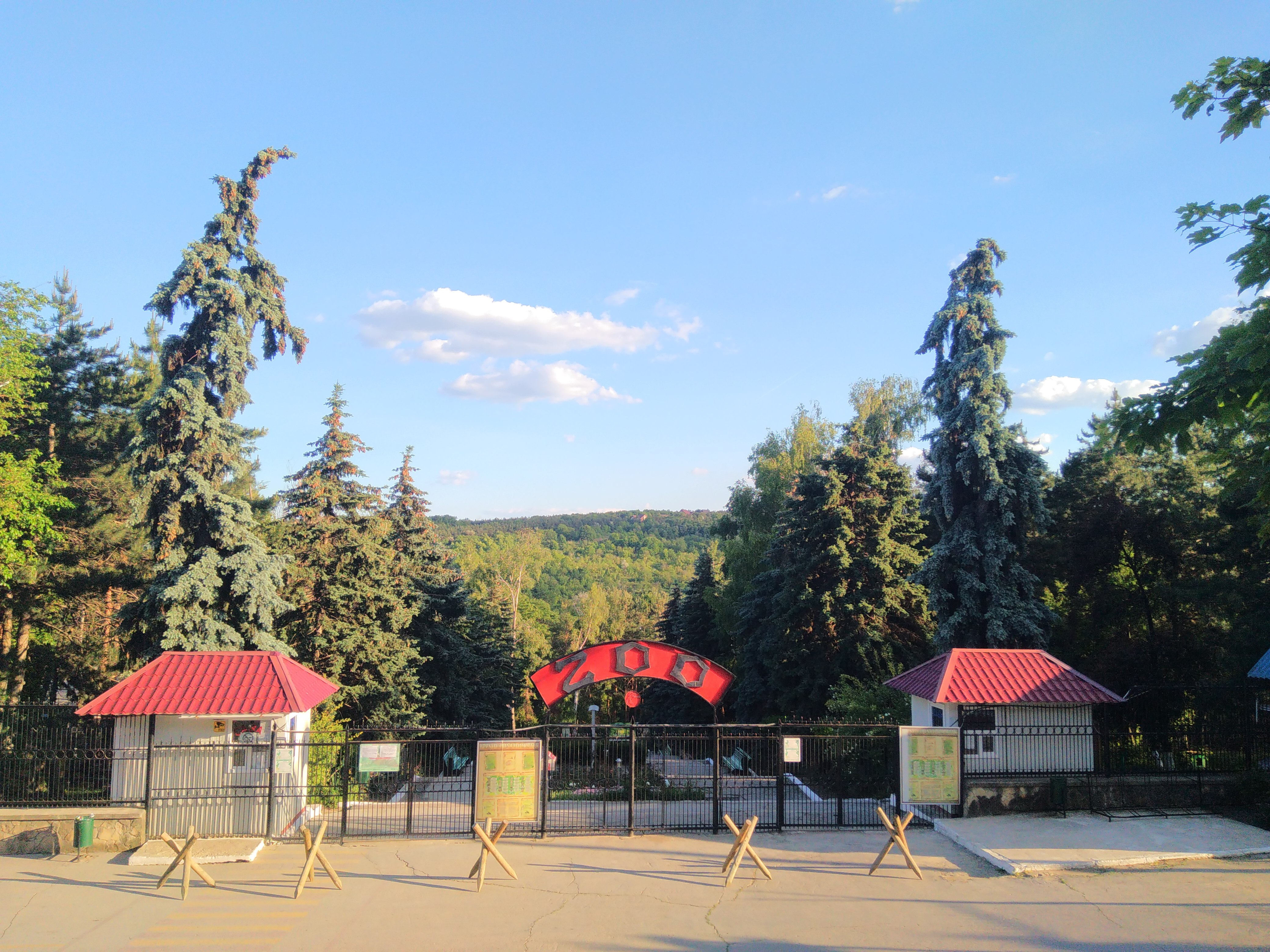 Molid argintiu, monument al naturii amplasat în mun. Chișinău, bd. Dacia 50/7, la intrarea centrală în Grădina Zoologică (cod MD-C-mn.Cb-156) Cb-156